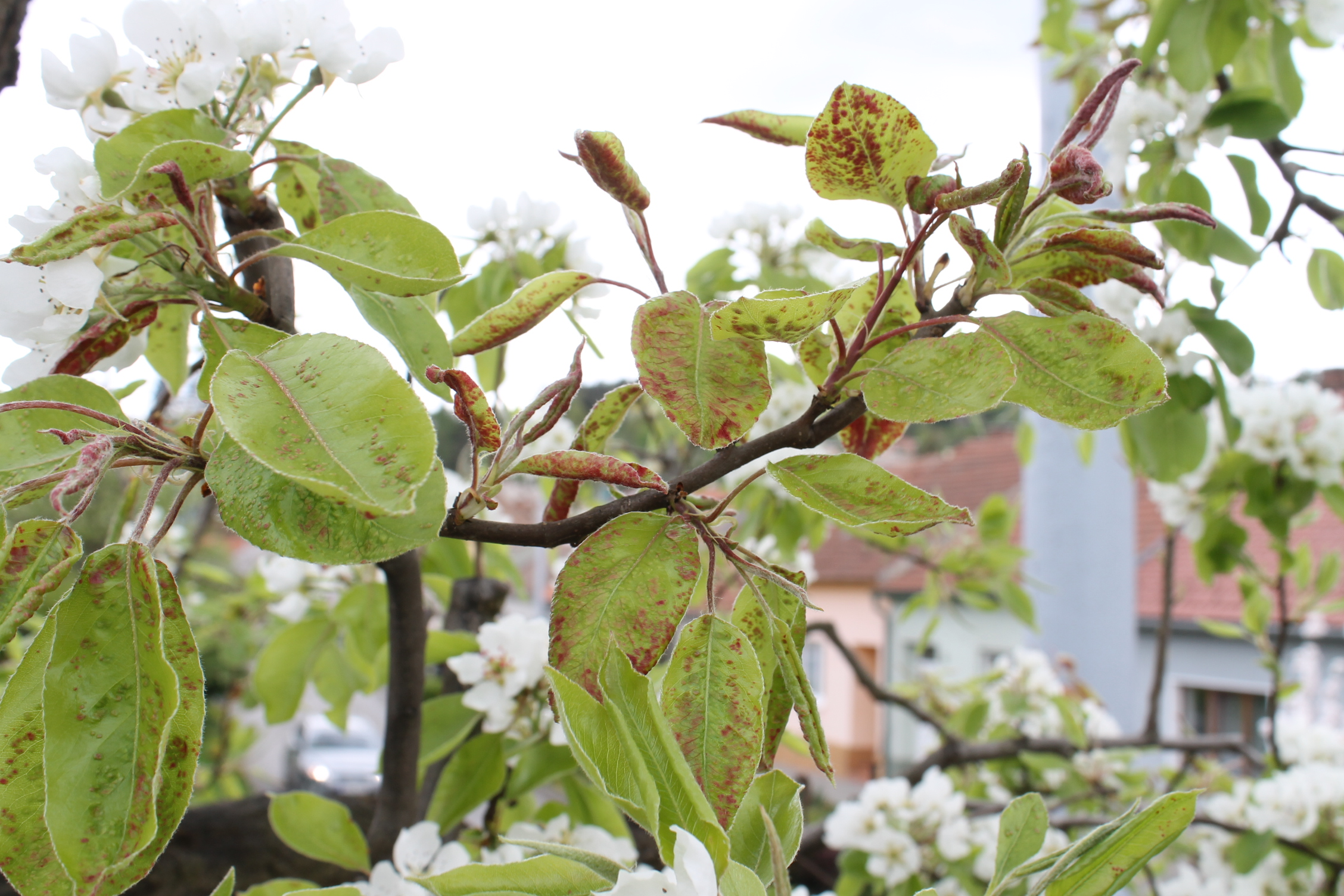 Vlnovník hrušňový (Eriophyes pyri) , Brno-Komín, hrušeň